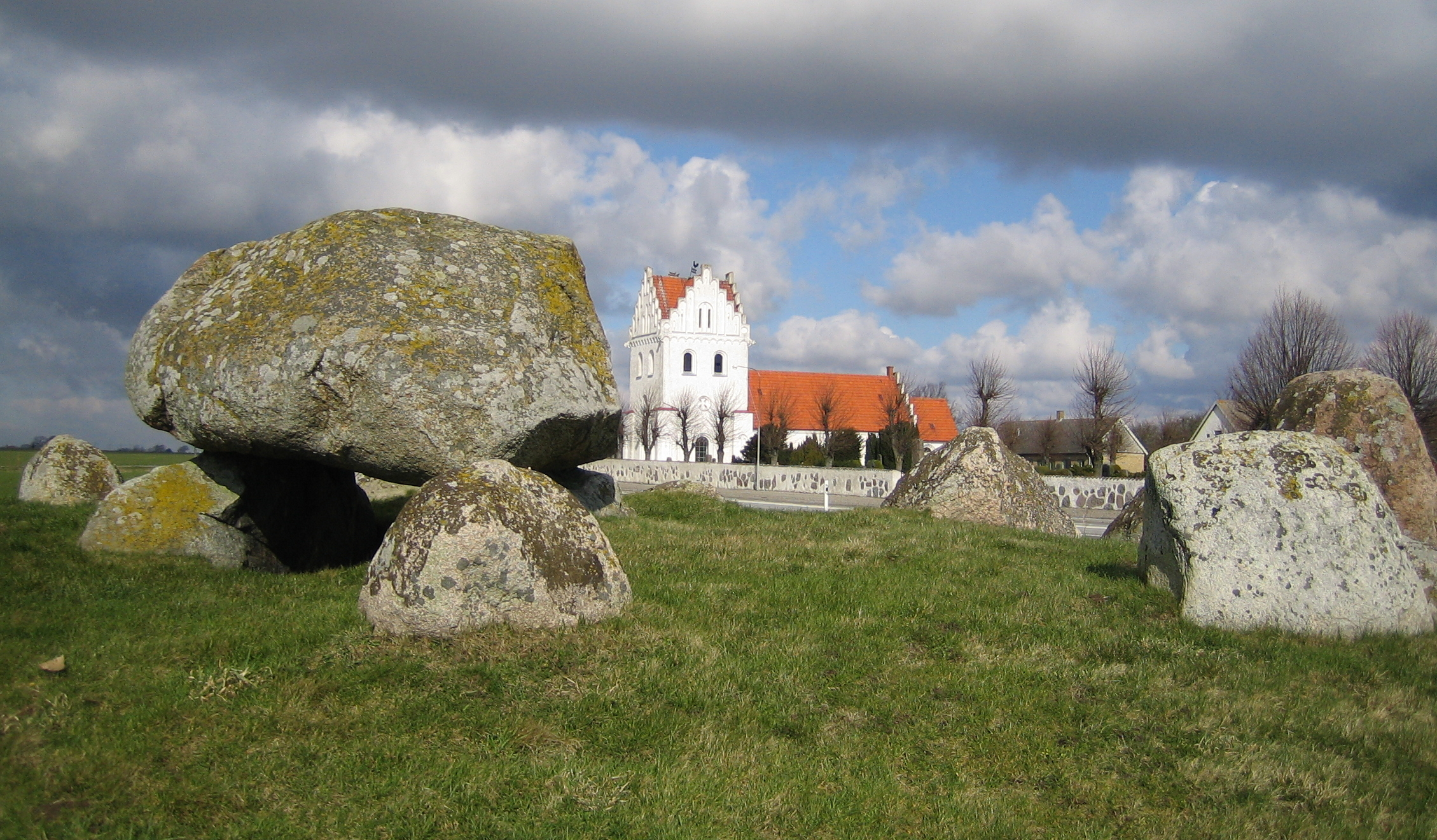 Skegrie megalith grave in Skåne, Sweden